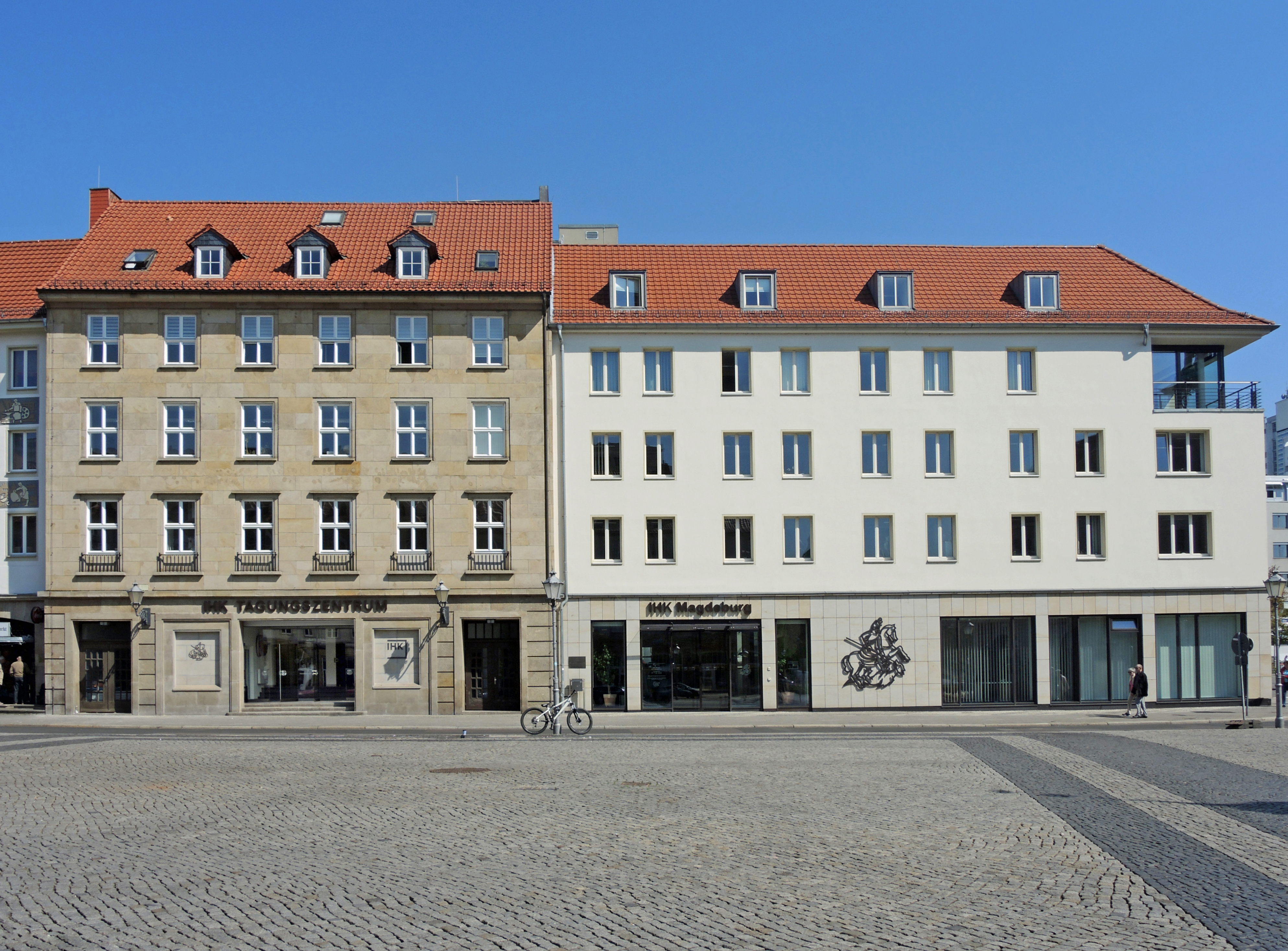 Das Gebäude der IHK Magdeburg am Alten Markt 8. Links das ehemalige Kino Theater des Friedens, vorher Deulig-Palast.